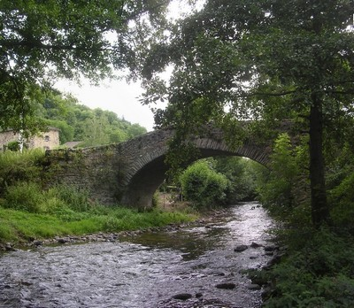 Ssianne vers Auriac l'Eglise